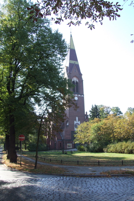 Petruskirche in Berlin-Lichterfelde, vormals Giesensdorf Fotograf: Harald Rossa Datum: September 2006 Höher aufgelöste Version ist verfügbar